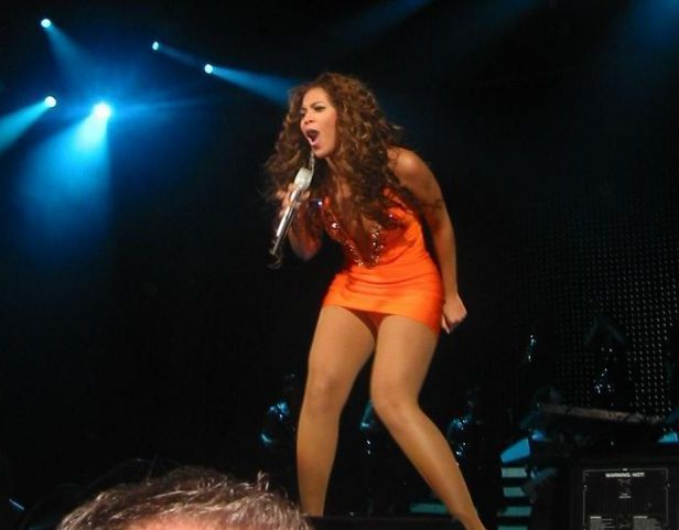 Beyoncé Knowles singing "Déjà Vu"